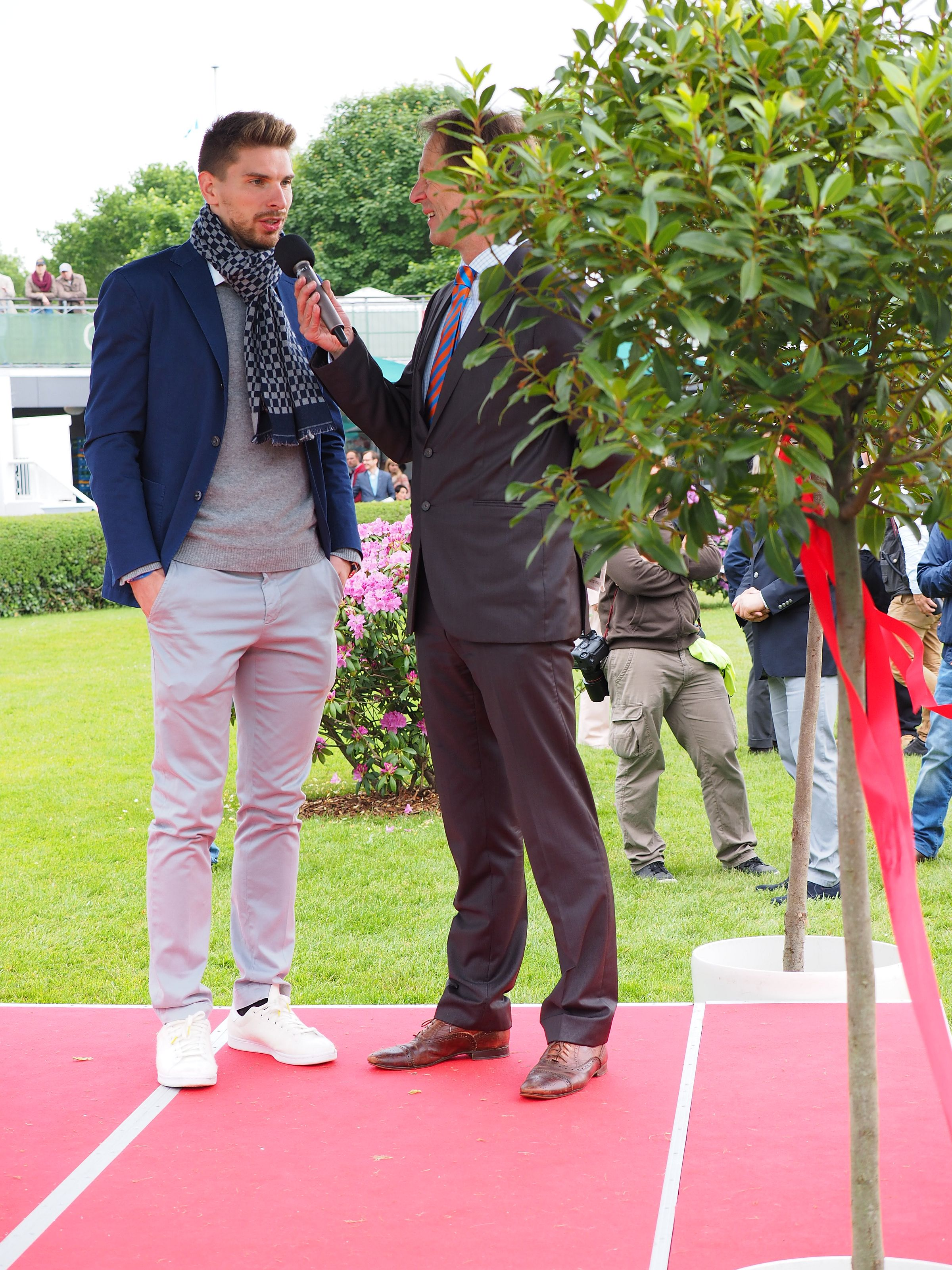 Ron-Robert Zieler bei einem Interview auf der Neuen Bult